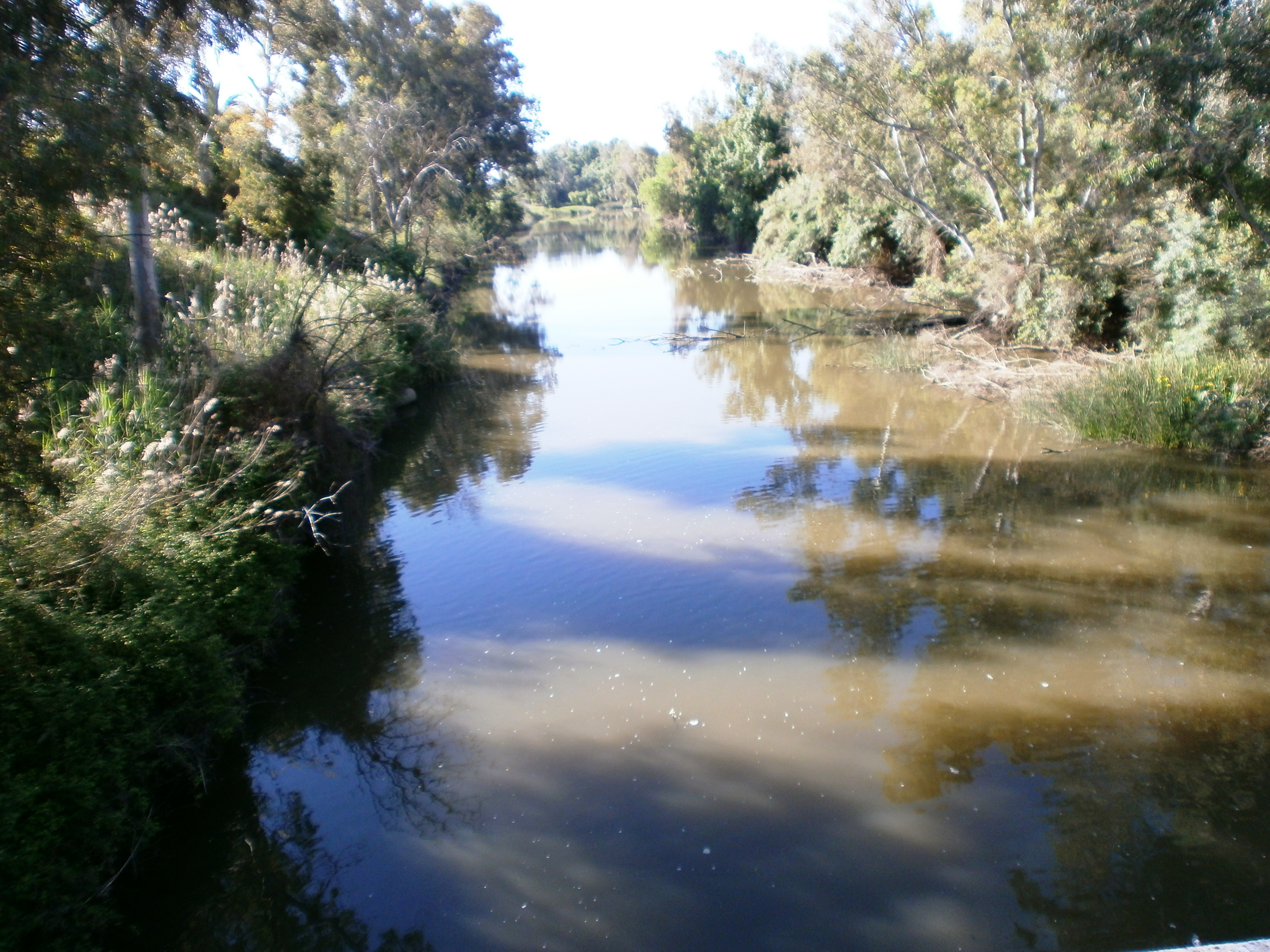 Río Caya en la frontera de España y Portugal